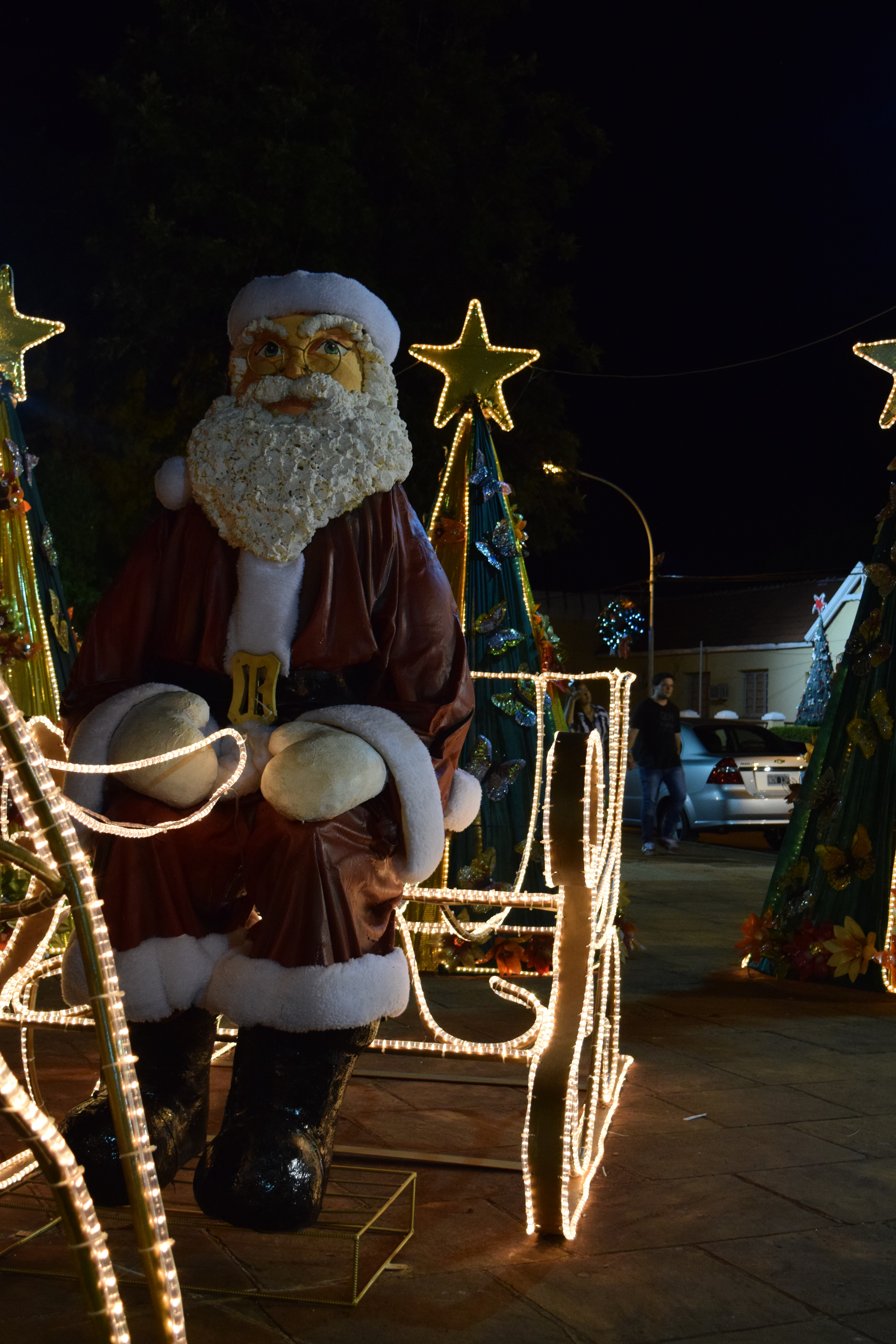 Papa Noel decorativo en la Fiesta Nacional del Inmigrante de la ciudad de Leandro N. Alem, Misiones, Argentina.